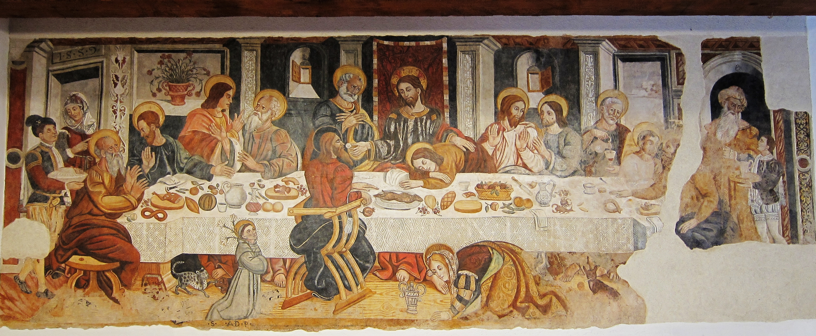 Fresque représentant la Cène au convento di Sant'Antonio à Rivello (Basilicate).